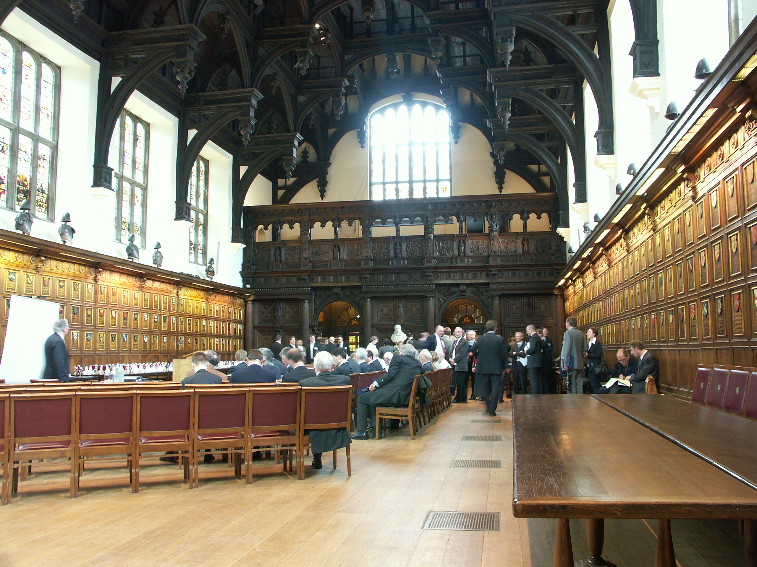 Middle Temple Hall, London, interior